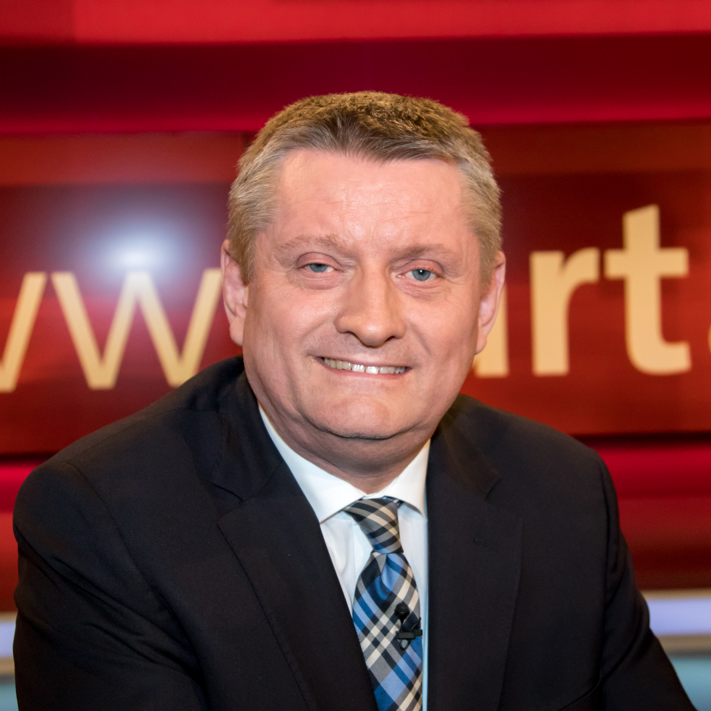 Hermann Gröhe in der WDR-Sendung "hart aber fair" am 3. April 2017